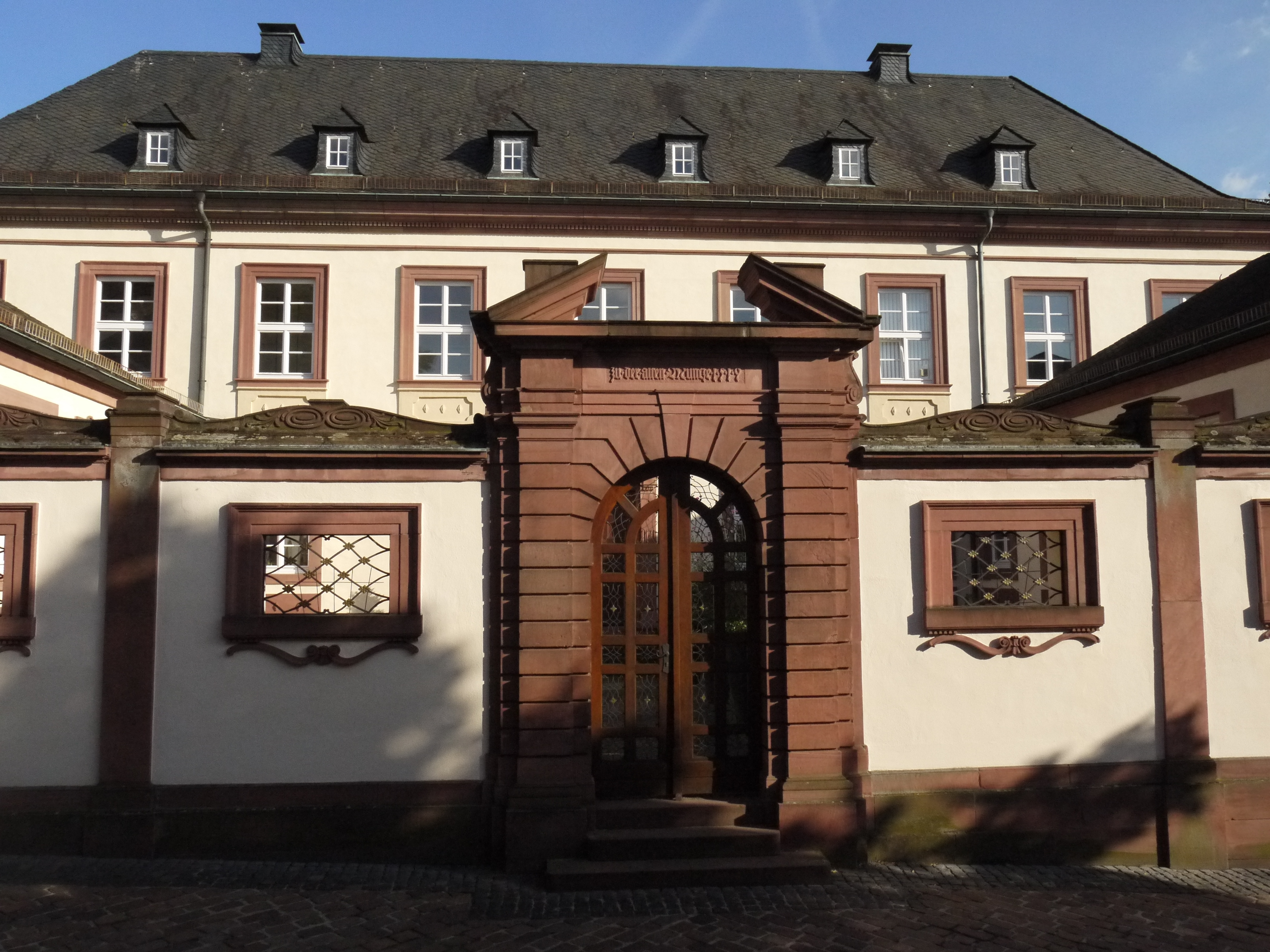 Stiftsgasse 6, ehemaliger Dekanatshof (denkmalgeschützt) in Aschaffenburg